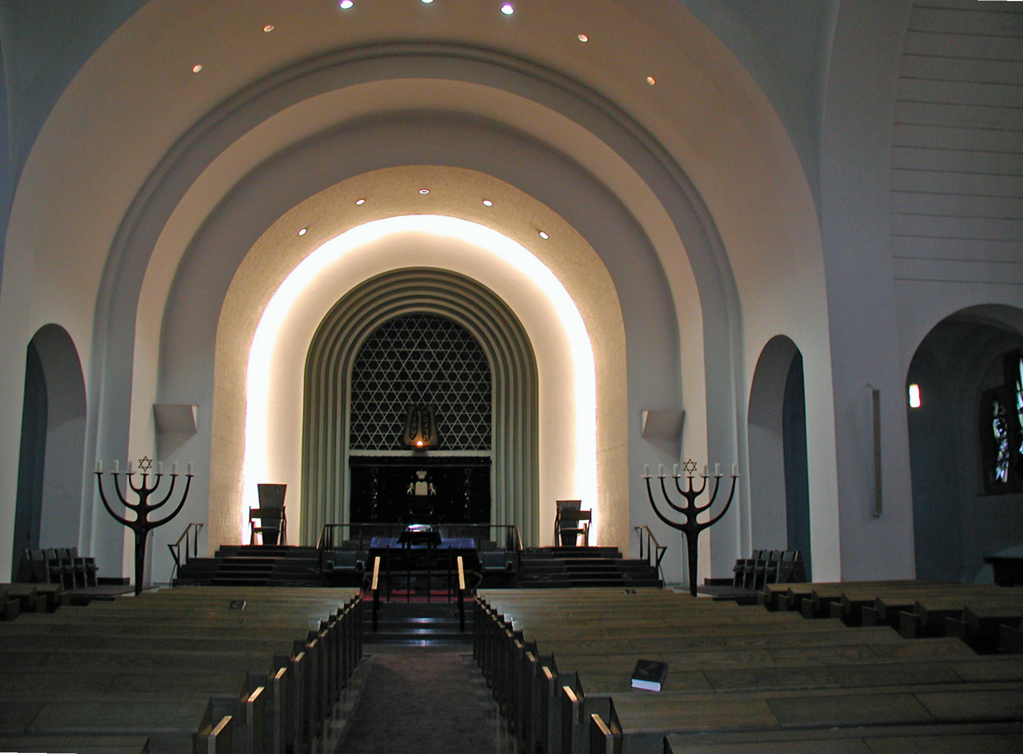 Köln, Synagoge-Roonstraße, Blick auf Toraschrein und die Bina (Toralesepult)